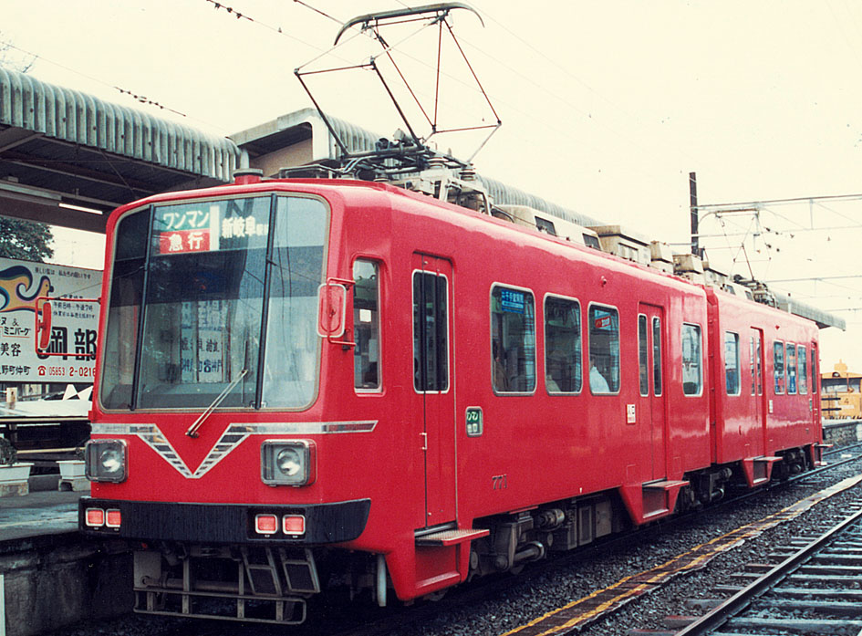 名古屋鉄道 771+770